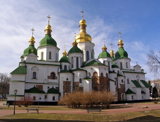 Свята Софія Київська